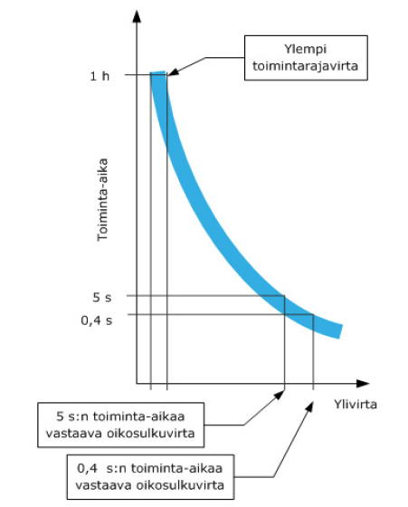 Sulakkeen toimintarajat